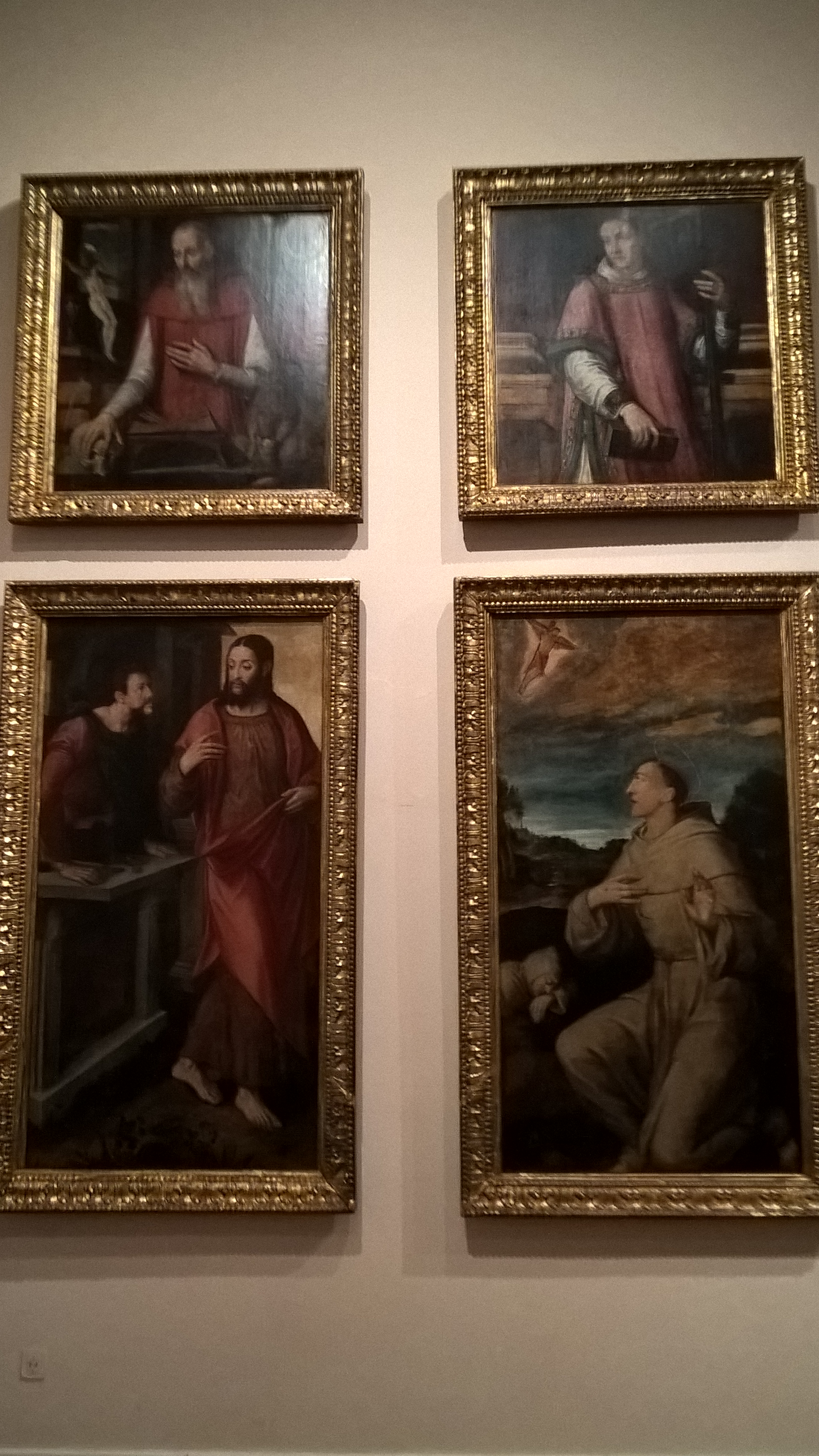 O Políptico flamengo do Altar de S. António são as quatro pinturas sobre madeira que ladeiam a estátua de Santo António no altar dedicado a este santo na Sé Catedral da cidade do Funchal e que se julga terem sido obra de Michiel Coxie ou do seu atelier. Estão actualmente em exposição no Museu de Arte Sacra do Funchal. É constituido pelas pinturas: S. Jerónimo (90 x 70 cm), Vocação de S. Mateus (100 x 90 cm), S. Francisco recebendo os estigmas (100 x 90 cm) e São Lourenço (90 x 70 cm) (no sentido contrário ao do relógio e a contar do topo da esquerda)